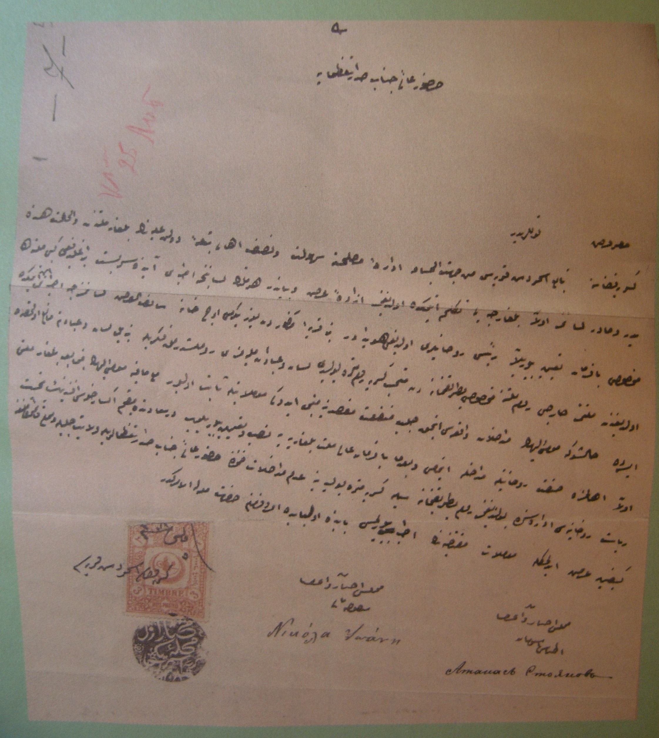 Арзухал (молба) от жителите на Смърдеш, Костурско до Великия везир, 5 май 1892 г.